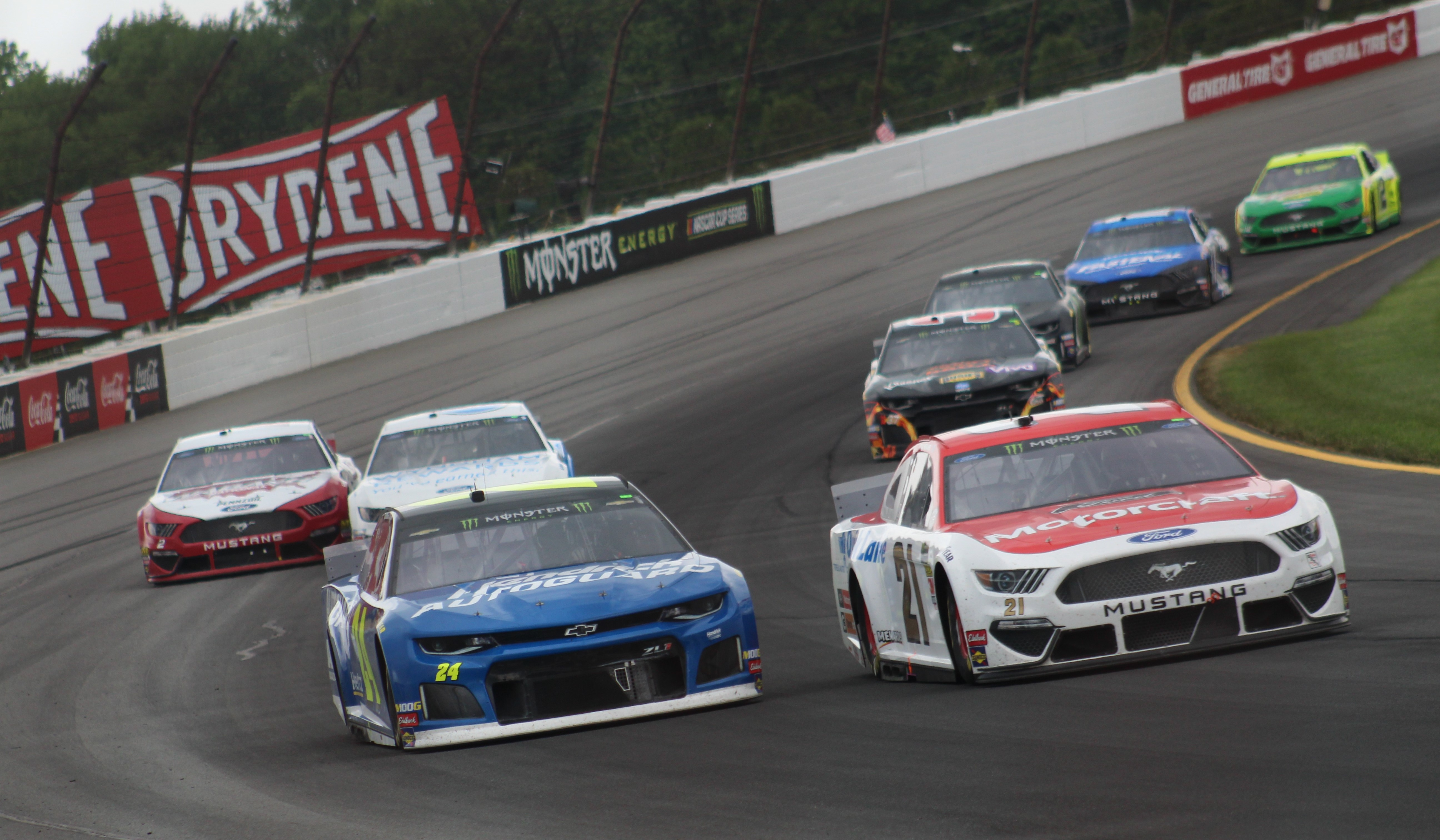 2019 Pocono 400